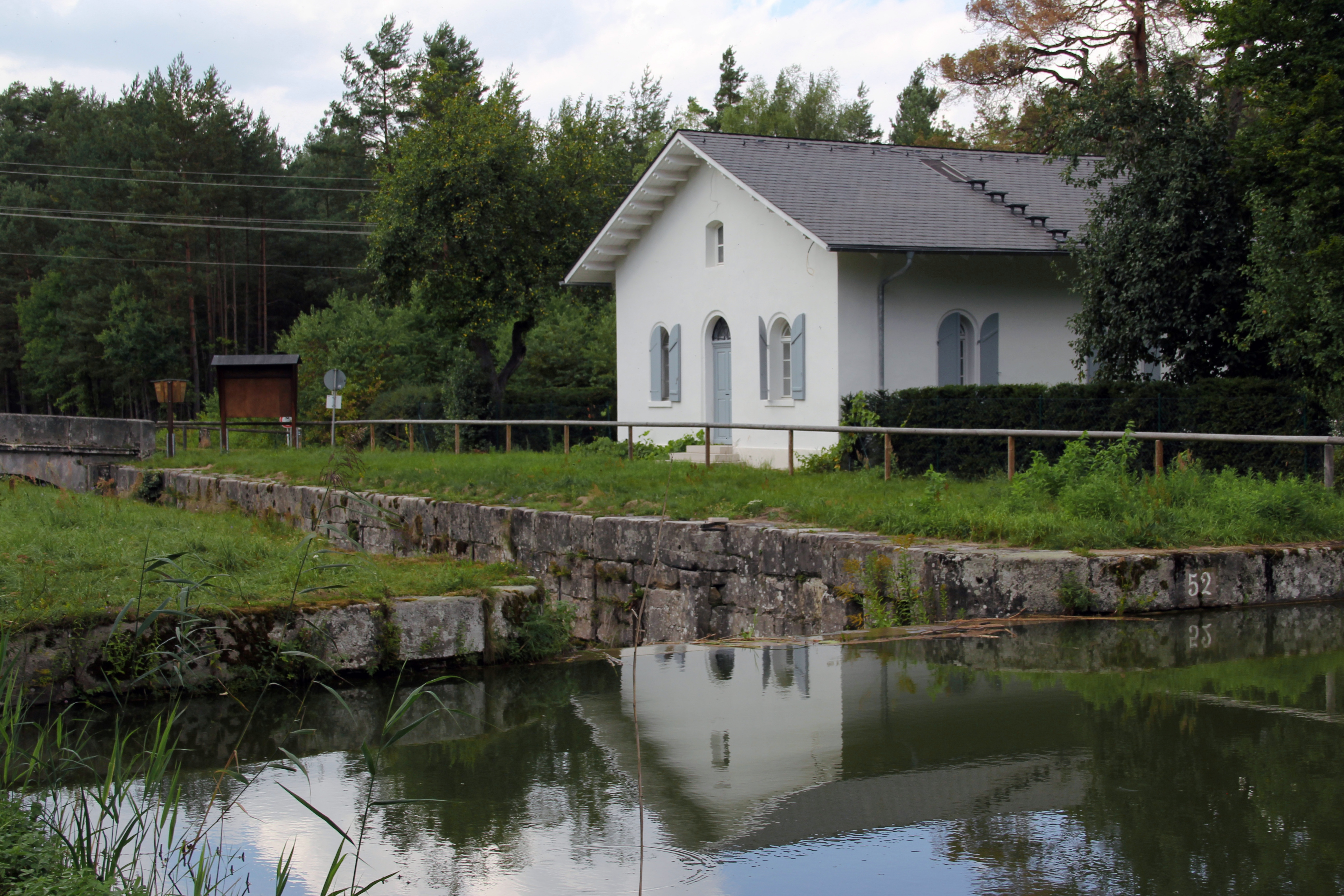 Schleuse 52, Ludwig-Donau-Main-Kanal